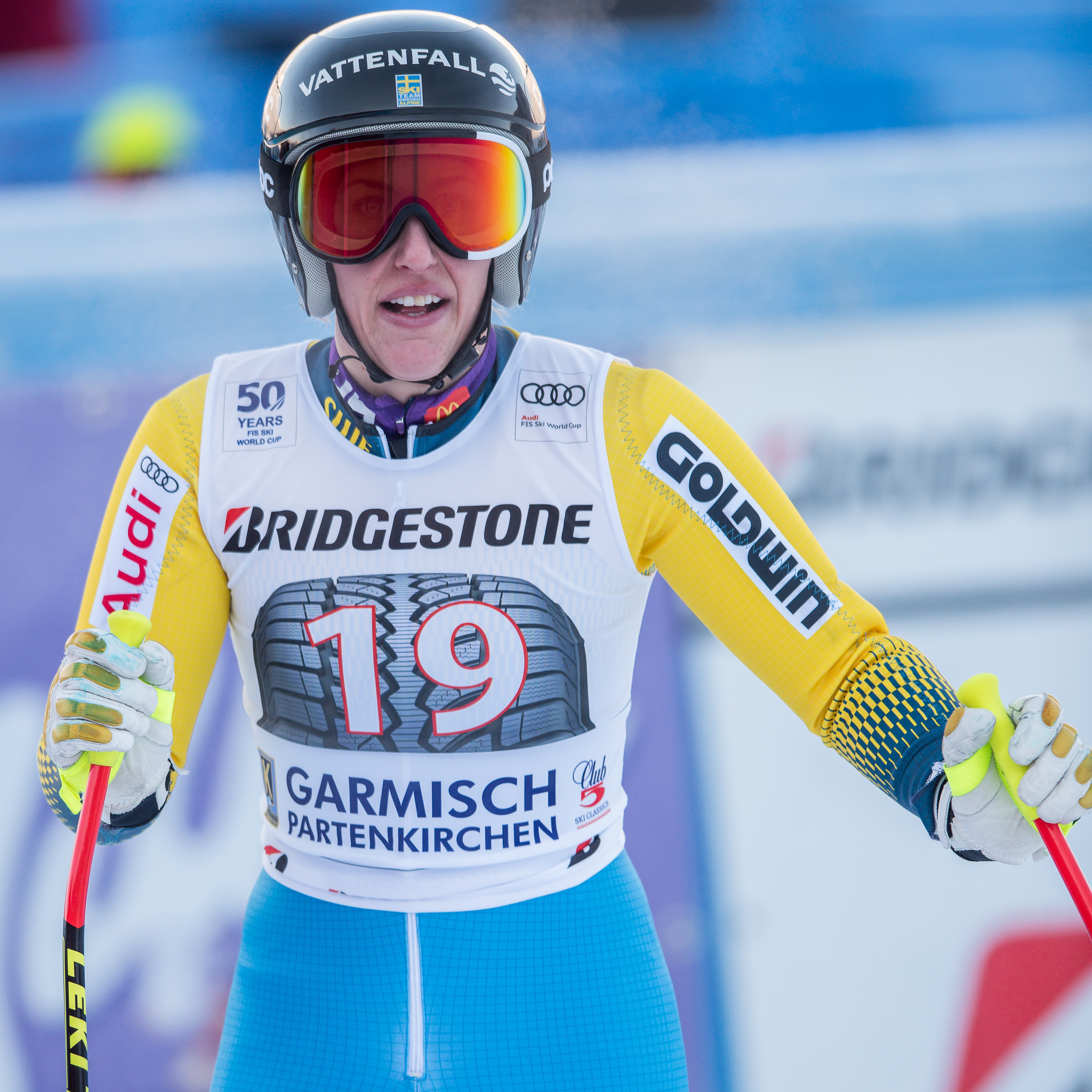 64. Kandahar Rennen,Audi FIS Ski Weltcup Garmisch-Partenkirchen,Damen Abfahrt,Kajsa Kling,Kandahar,Ladies Downhill